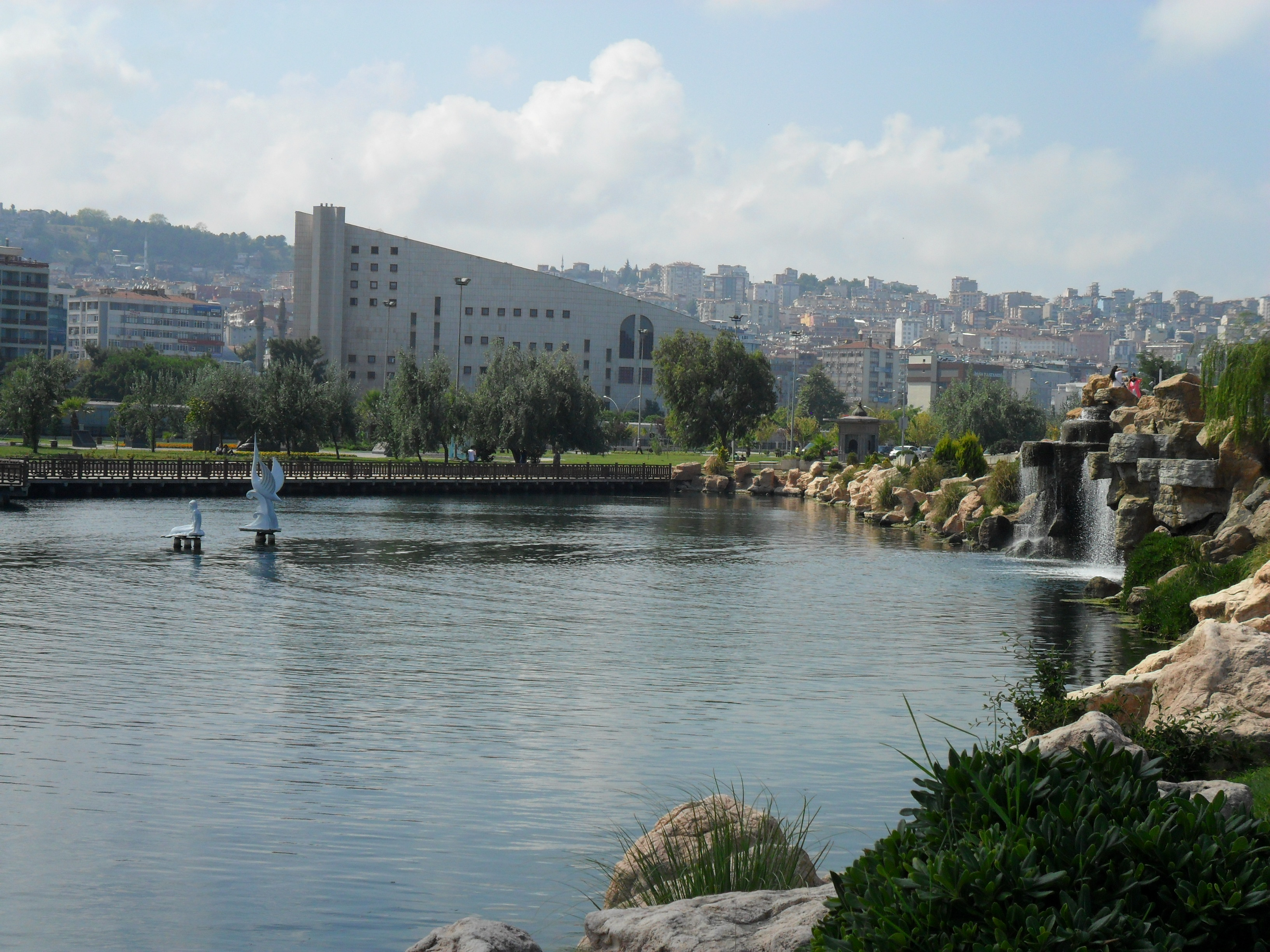 Kurtuluş İskelesi'nin karşısında yer alan yapay göl.